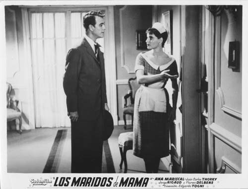 Fotografía blanco y negro sobre papel fotográfico brillante con marco perimetral blanco con datos generales en el borde inferior. Escena de la película Los maridos de mamá donde aparece Cristina Berys de medio cuerpo, con uniforme de mucama, señalando una puerta y mirando a George Rigaud, con traje y corbata.